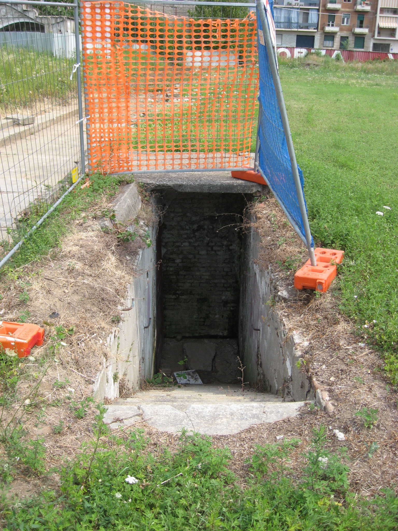 Old Filadelfia stadium in Turin